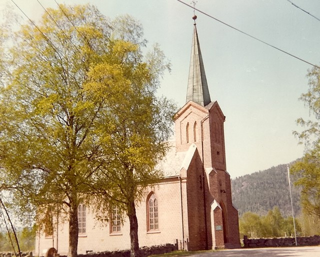 Tuft kirke